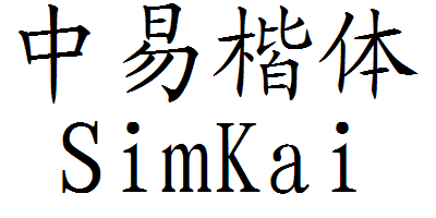 中易楷体字形示例